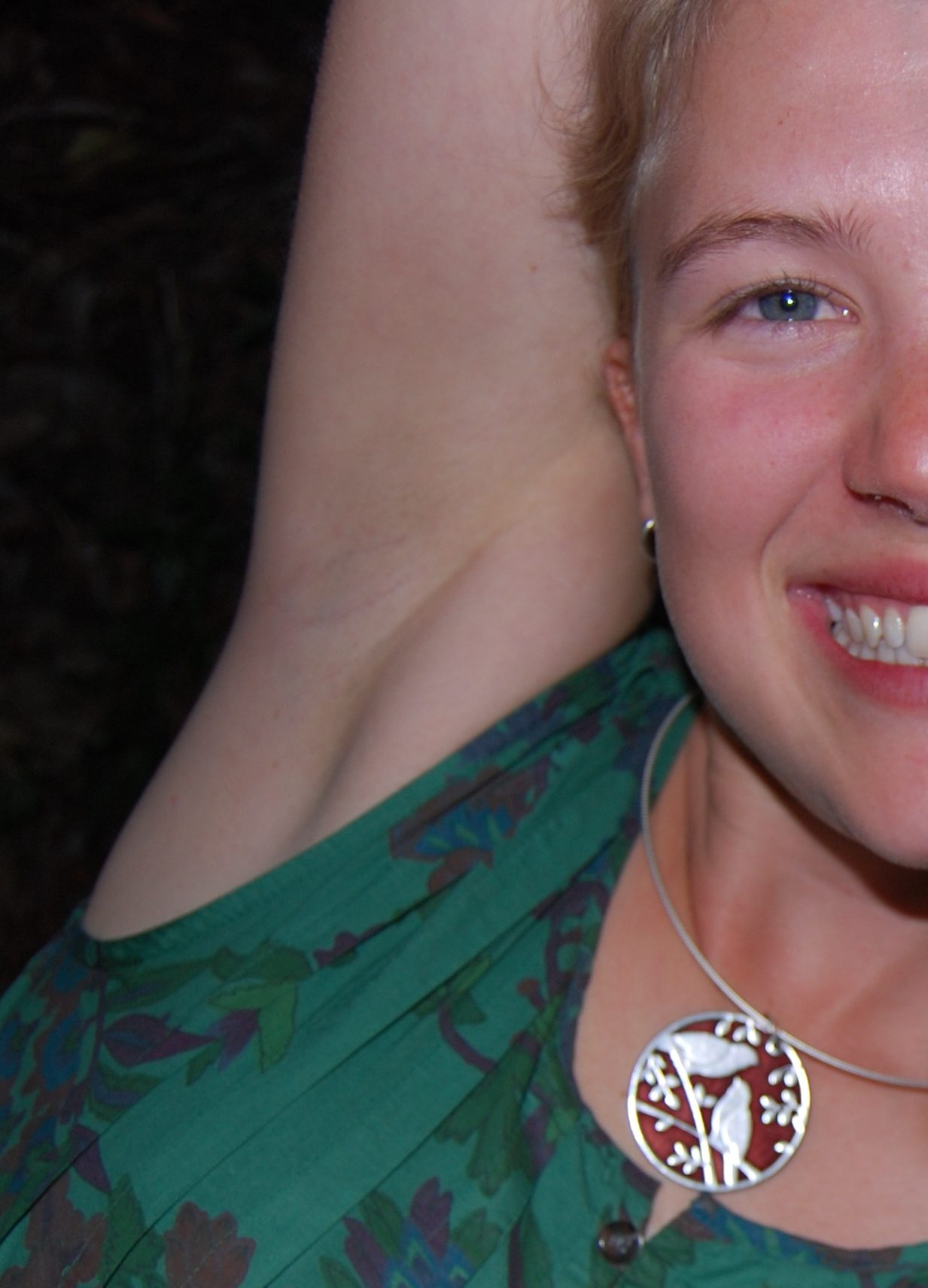 surprise!